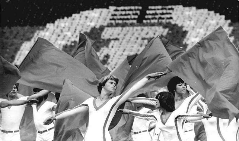 Leipzig, Sportfest, Eröffnungszeremonie, Probe ADN-ZB Kluge 30.7.77-str-Leipzig: Sportfest - Sportschau - Zu den Darbietungen beim Prolog der großen Sportschau des DTSB der DDR gehört auch diese Gymnastik mit Fahnen. 100.000 Zuschauer erlebten am 30.7. im Leipziger Zentralstadtion die begeisternde Premiere dieser Schau.